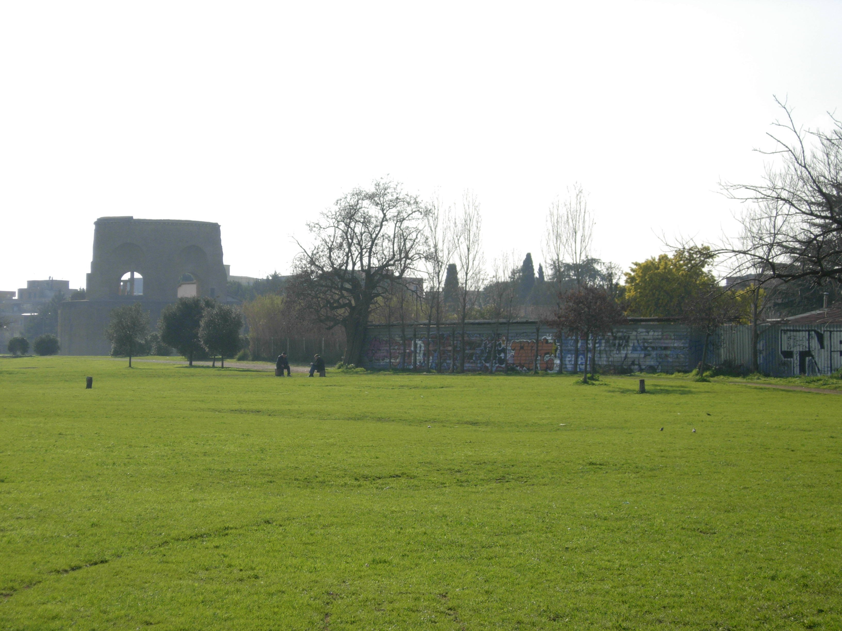 Roma - Villa de Santis - Mausoleo di Sant'Elena